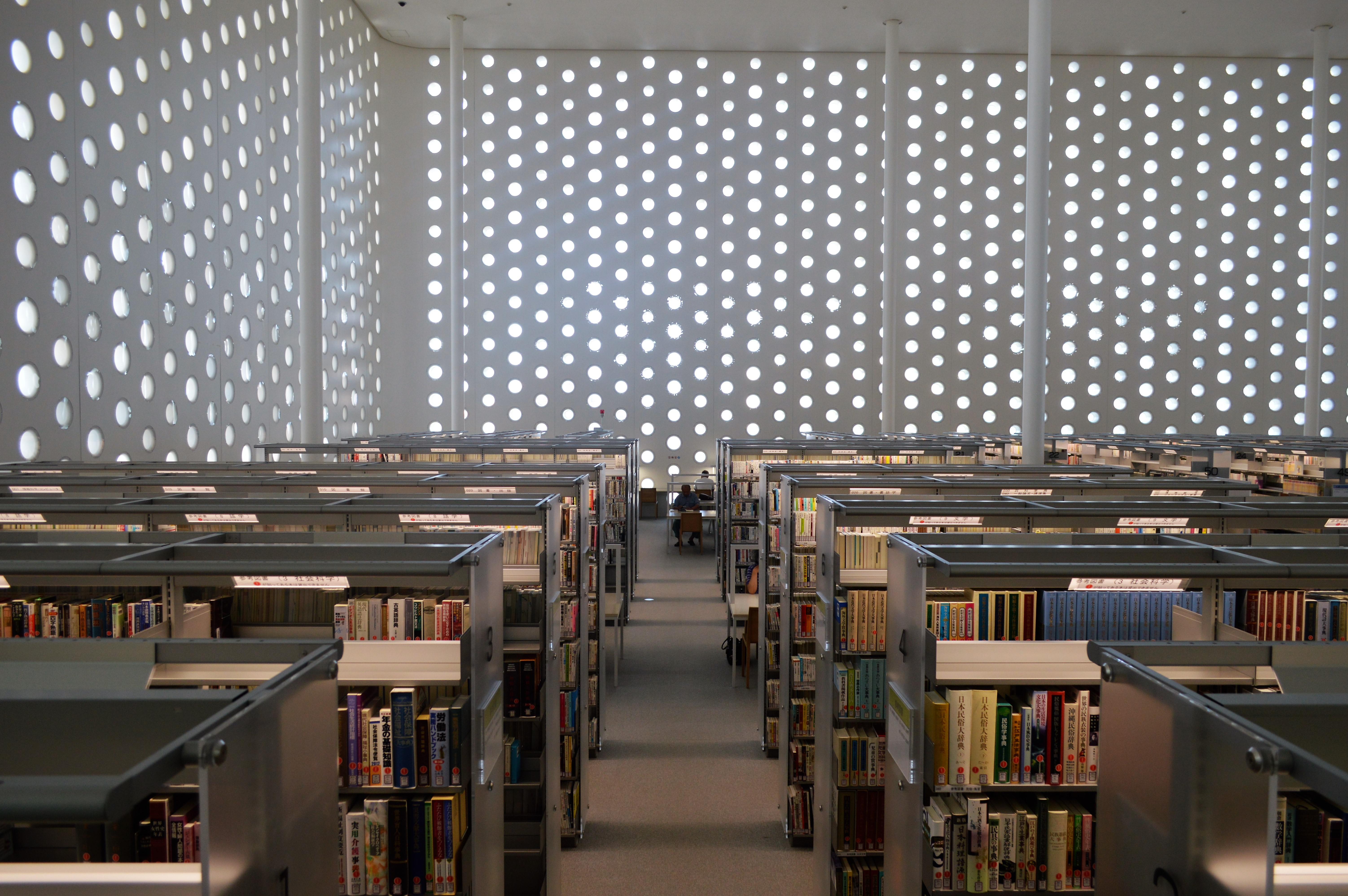 石川県金沢市 金沢海みらい図書館。金沢市図書館のひとつ。2階。